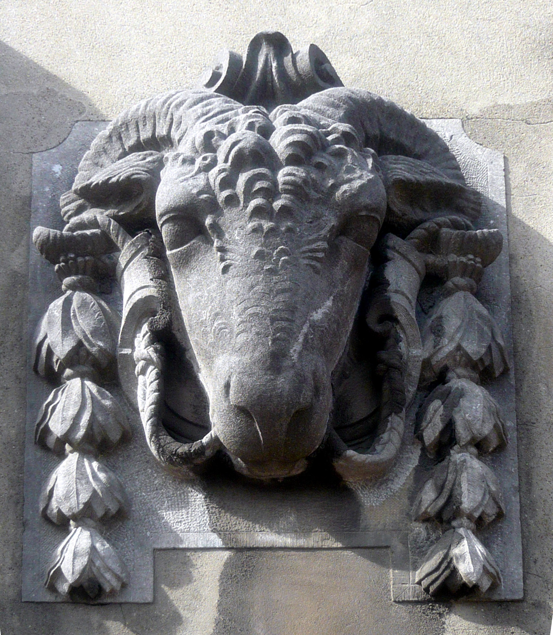 Schafskopf am Gebäude der Wollwäscherei Traitex in Verviers